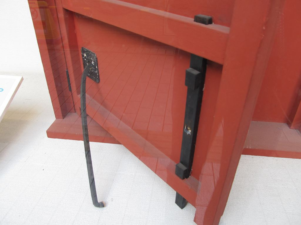 くるる鉤（くるるかぎ）、カギ、鍵